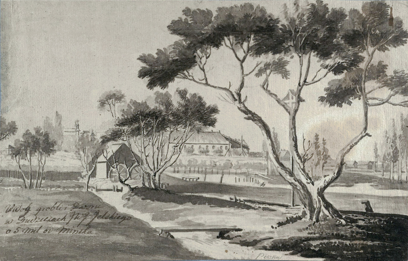 Беларуская (тарашкевіца): Дудзічы (Dudzičy), сядзіба Ельскіх (Jelski)